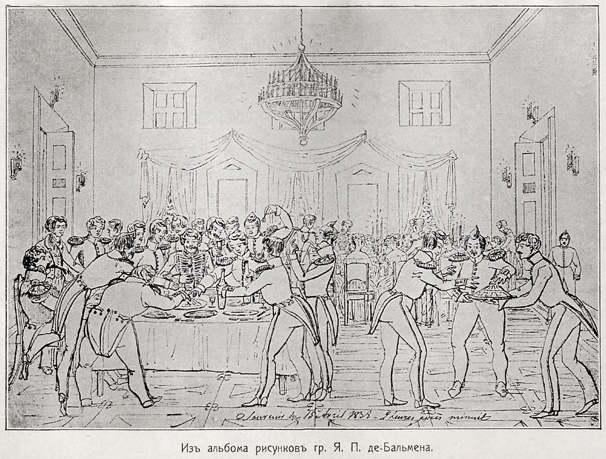 Данное изображение было использовано в статье «Бальмен, де, Яков Петрович, граф» опубликованной в четвёртом томе «Военной энциклопедии», который был издан книгоиздательским товариществом Ивана Дмитриевича Сытина в 1911 году в столице Российской империи городе Санкт-Петербурге.